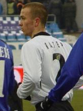 Enar Jääger, Estonian footballer.